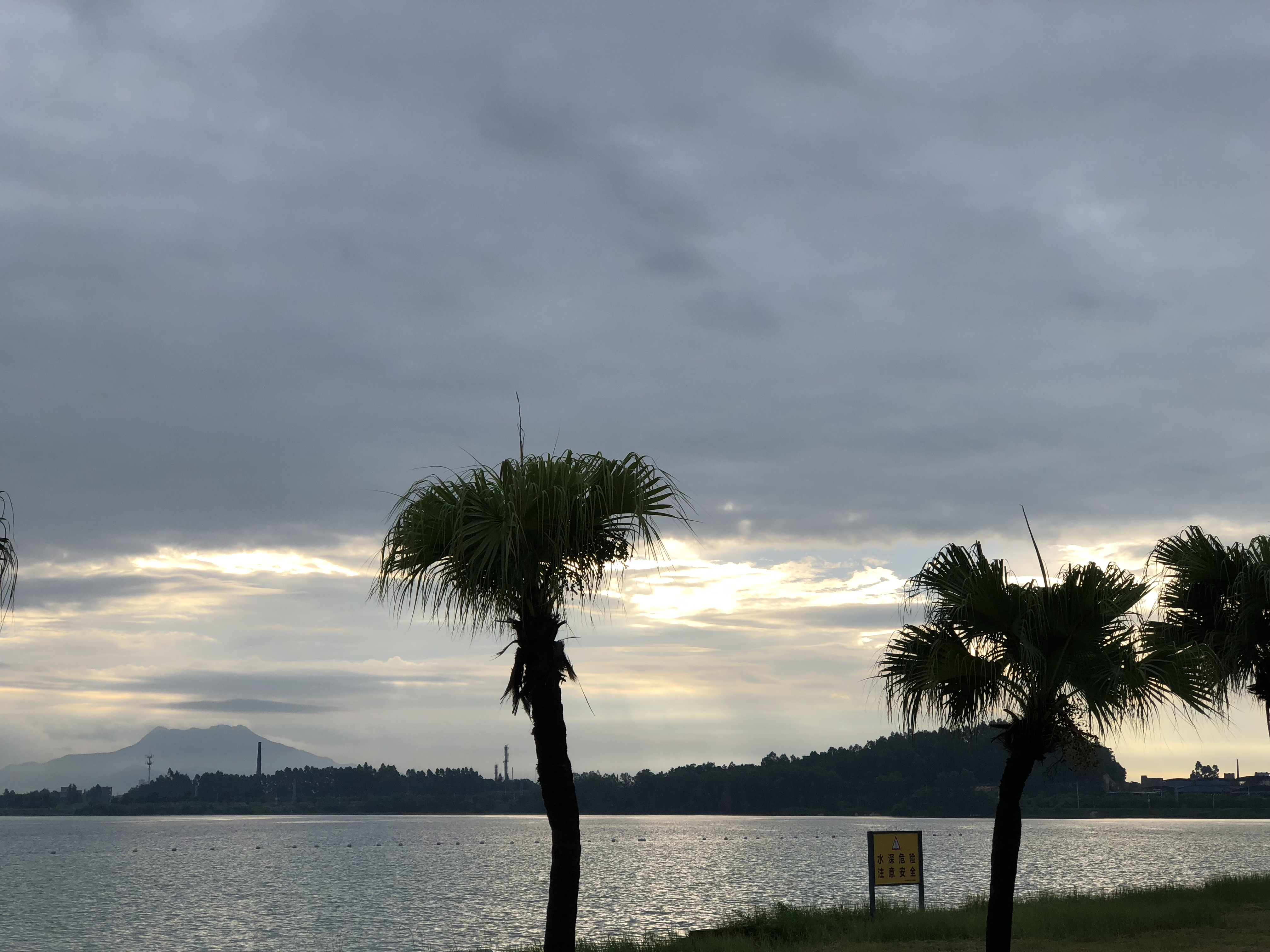 茂名市露天矿生态公园（原为茂名市露天矿开采基地，2016年经茂名市政府整治，建成现今公园）